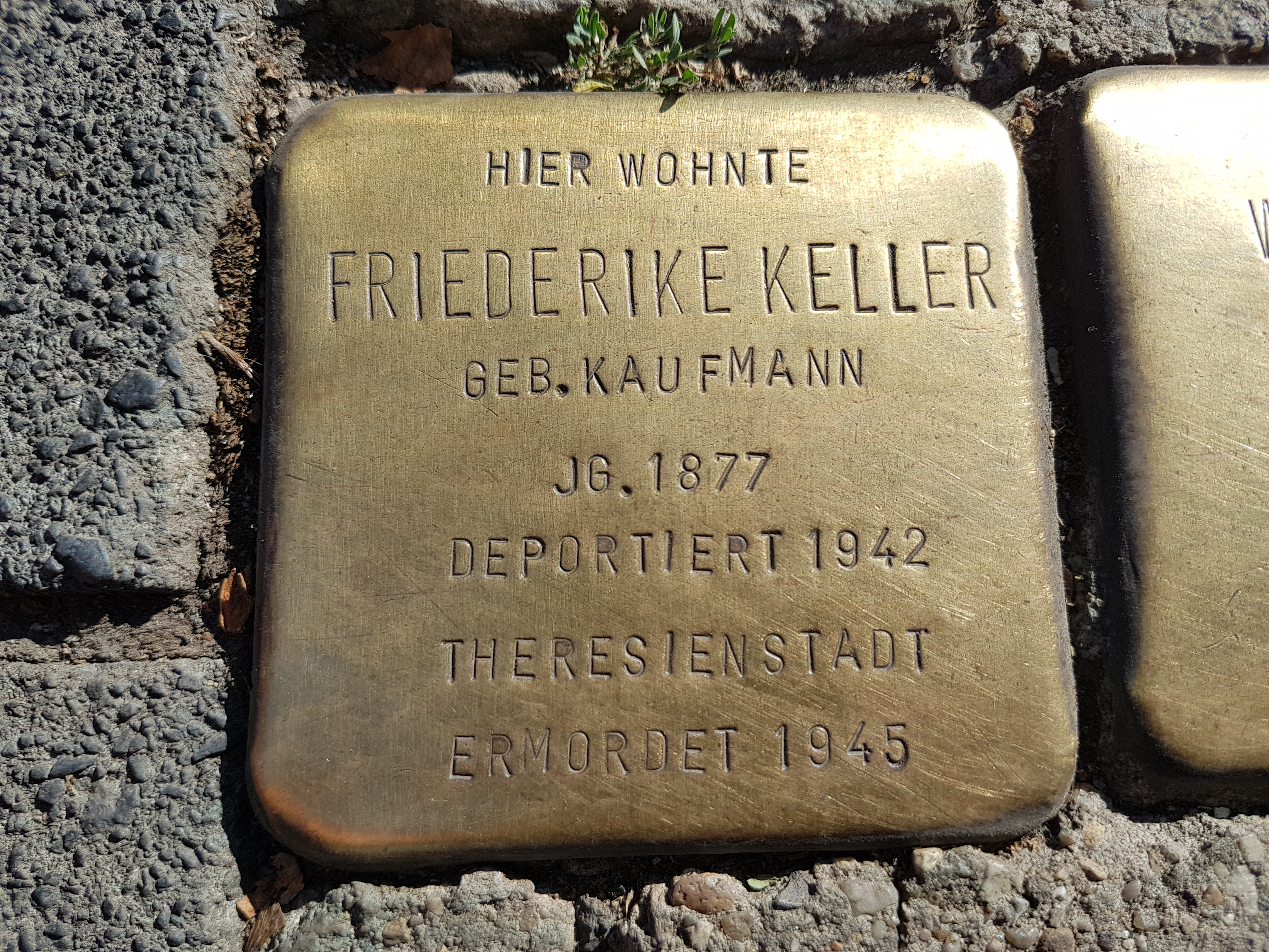 Stolperstein Duisburg Friederike Keller